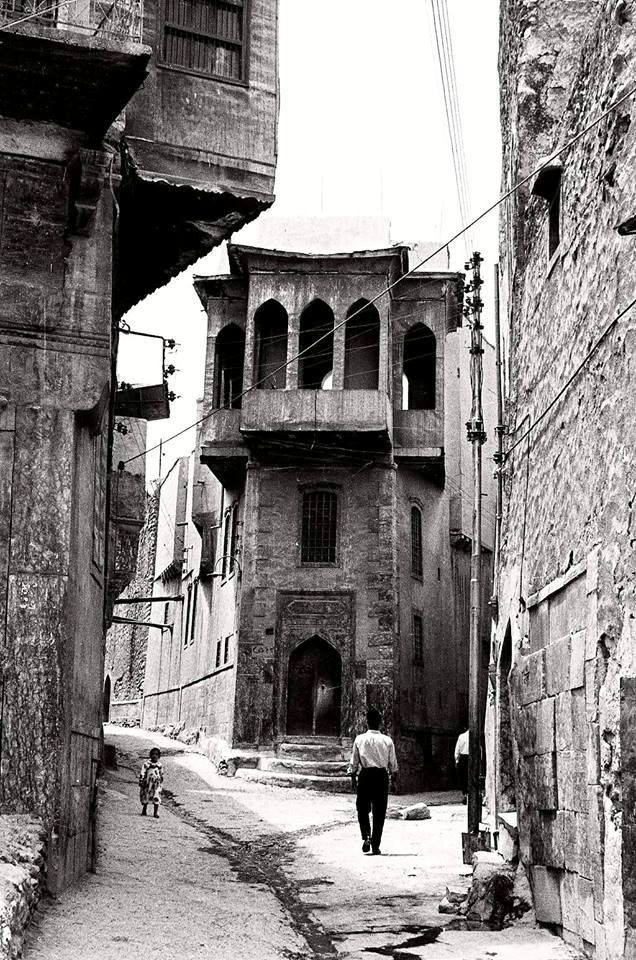 بيت التاجر الثري الحاج سعيد جلميران في الموصل، ولقد بناه في فترة العشرينات من القرن الماضي ويحتوي على ما يقارب عشرين غرفة في الداخل ويطل على زقاقين والطوابق مغلفة بالتوتيا والجنكو لتخفيف الحمل، والزقاق من جهة اليمين يذهب الى باب الجبلين ومن جهة اليسار الى بيت جاسم الصائغ والد سمير وأمير ومن بعدها الى جامع الشيخ نذير ومدرسة الخالدية، والصورة التقطت في صيف عام 1968 وهي في منطقة (محلة باب النبي) في الموصل